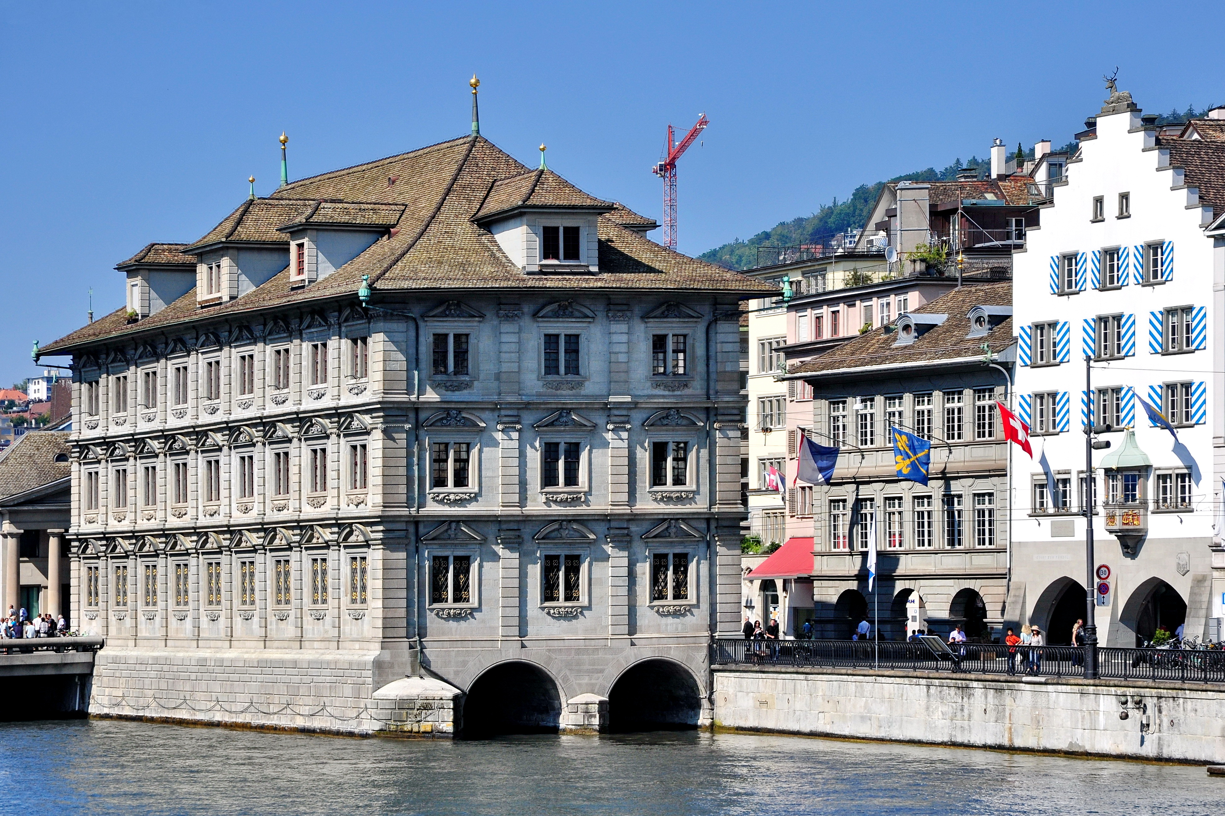 Rathaus in Zürich (Switzerland), as seen from Wühre nearby Münsterhof, Zunfthaus zur Saffran and Zunfthaus zur Haue to the right, Rathausbrücke to the left.